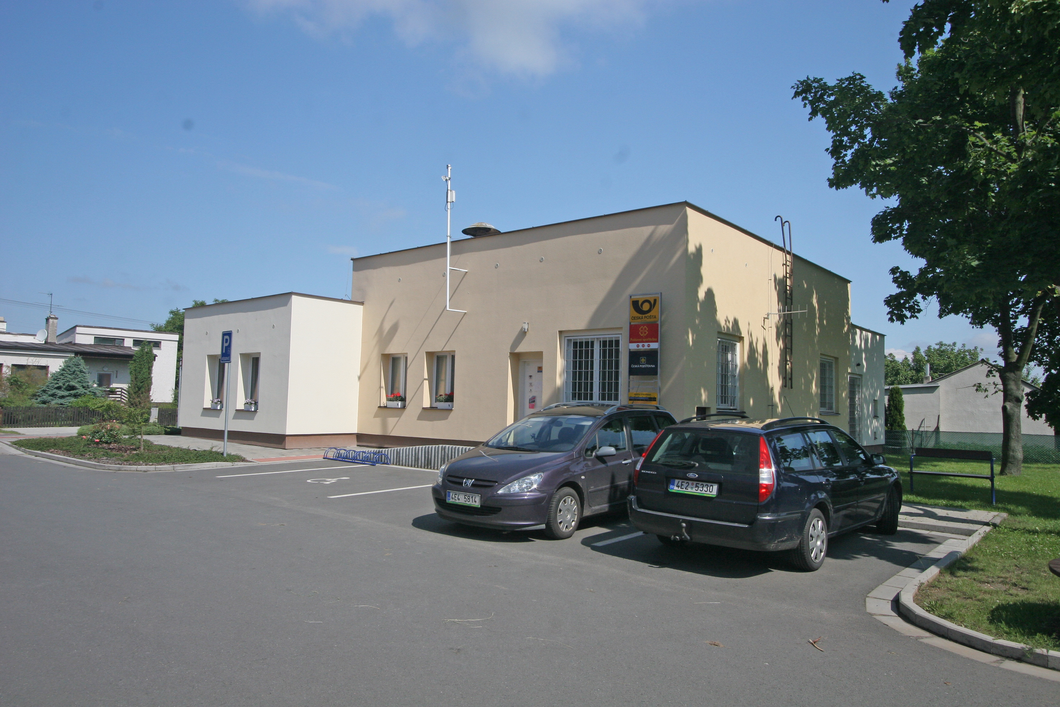 Čepí pošta